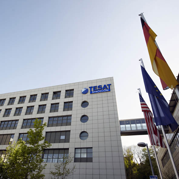 Tesat-Spacecom Standort Backnang